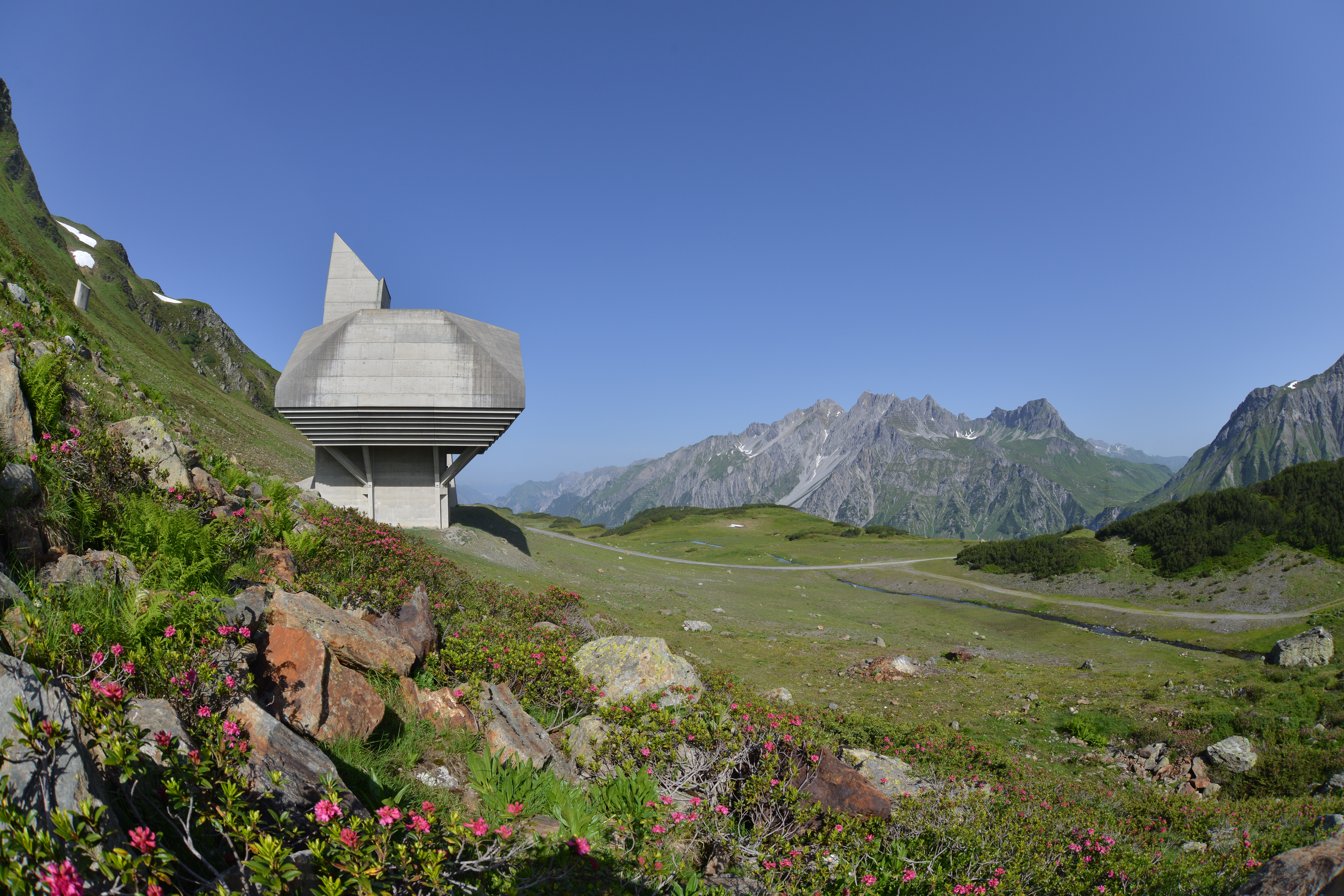 Tunnellüftung des Arlberg Straßentunnel auf der Stubinger Alpe oberhalb von Stuben im Klostertal.